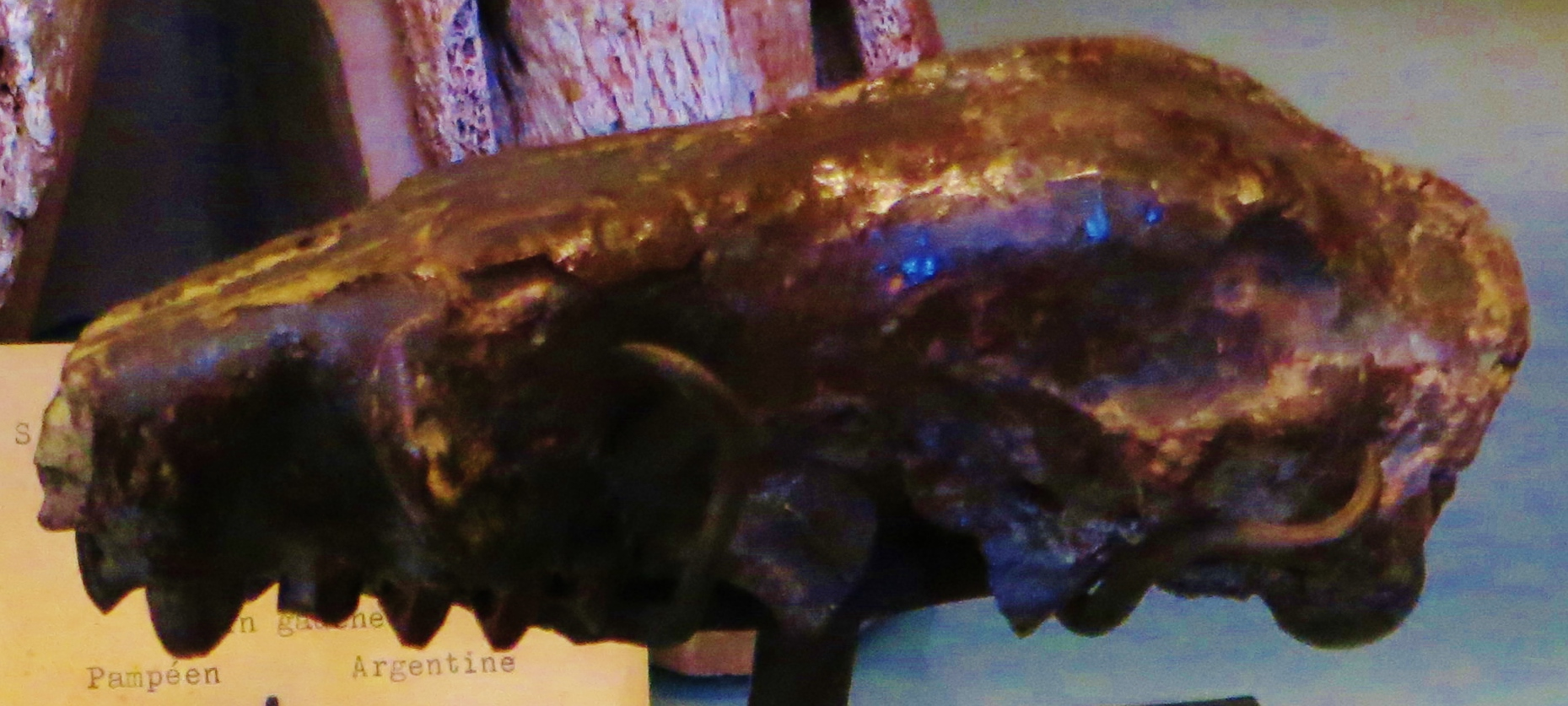 Fossil of Pelecyodon, an extinct mammal- Took the photo at Musee d'Histoire Naturelle, Paris